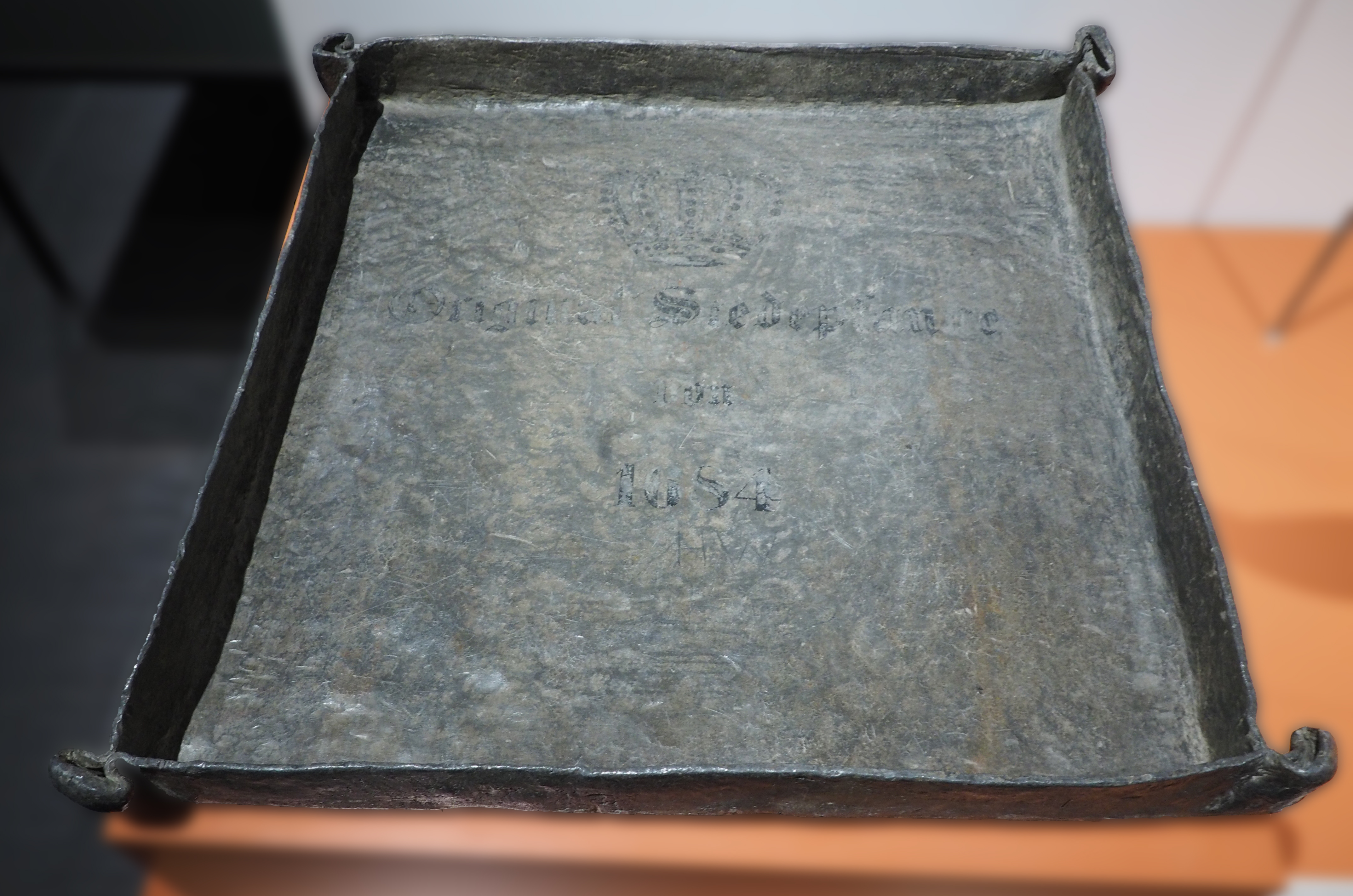 Siedepfanne der Lüneburger Saline (um 1775?) im Museum Lüneburg. (Aufschrift 1684 wurde vermutlich nachträglich aufgebracht)